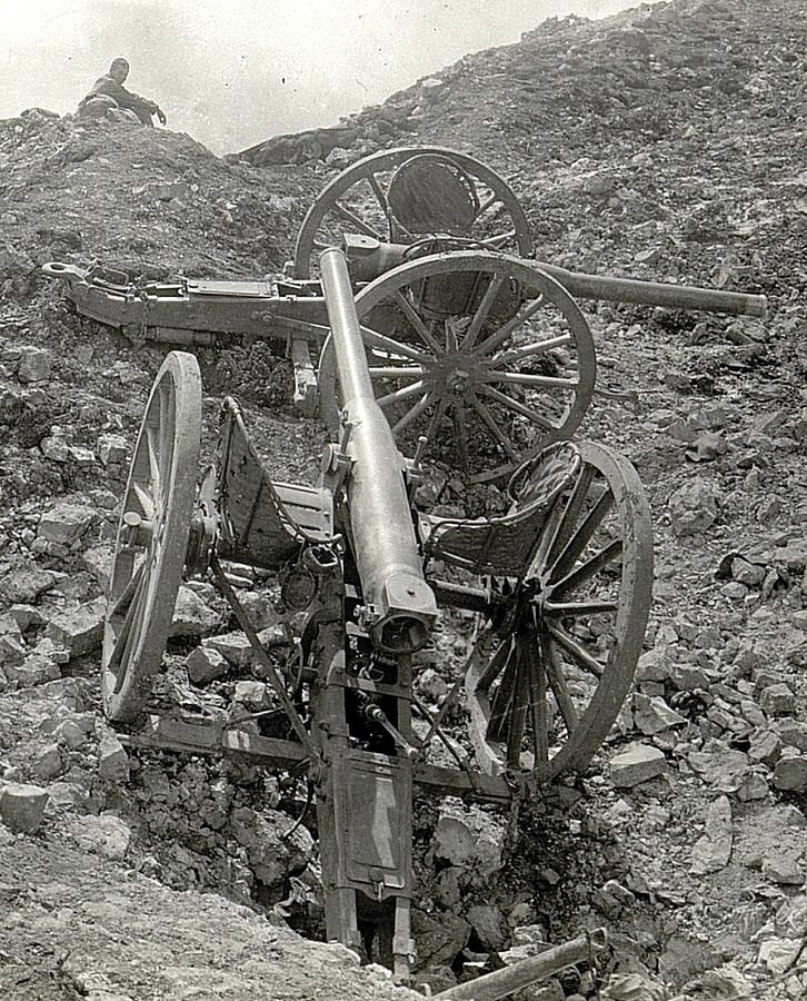 Zwei eroberte italienische Kanonen auf dem Monte Maggio. Aufgenommen am 22. Mai 1916.